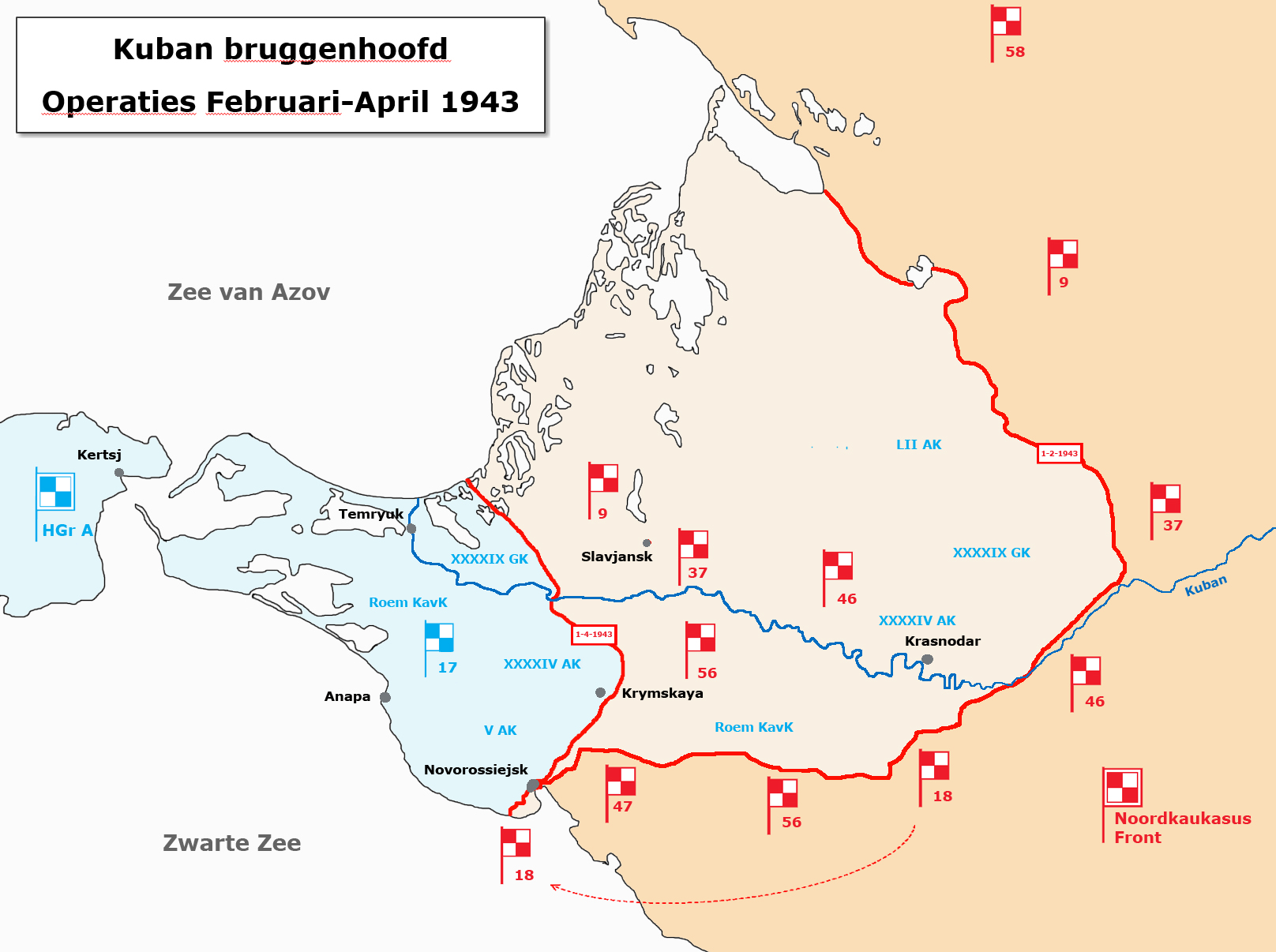 Correctie tov 1e versie: 2 namen korpsen omgewisseld nav terechte opmerking medegebruiker (bedankt!)